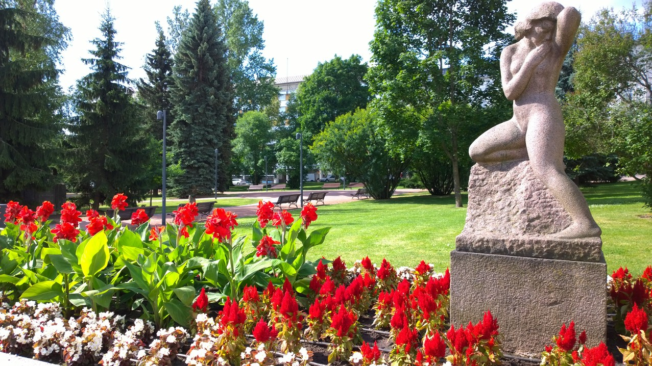 Jyväskylän Kirkkopuiston kukkaloistoa ja Oskar Raja-ahon teos Neito/Kevät/ikävä